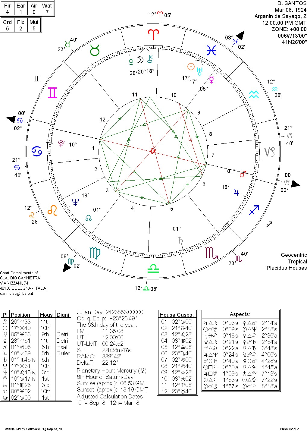 Demetrio santos. Horoscopo